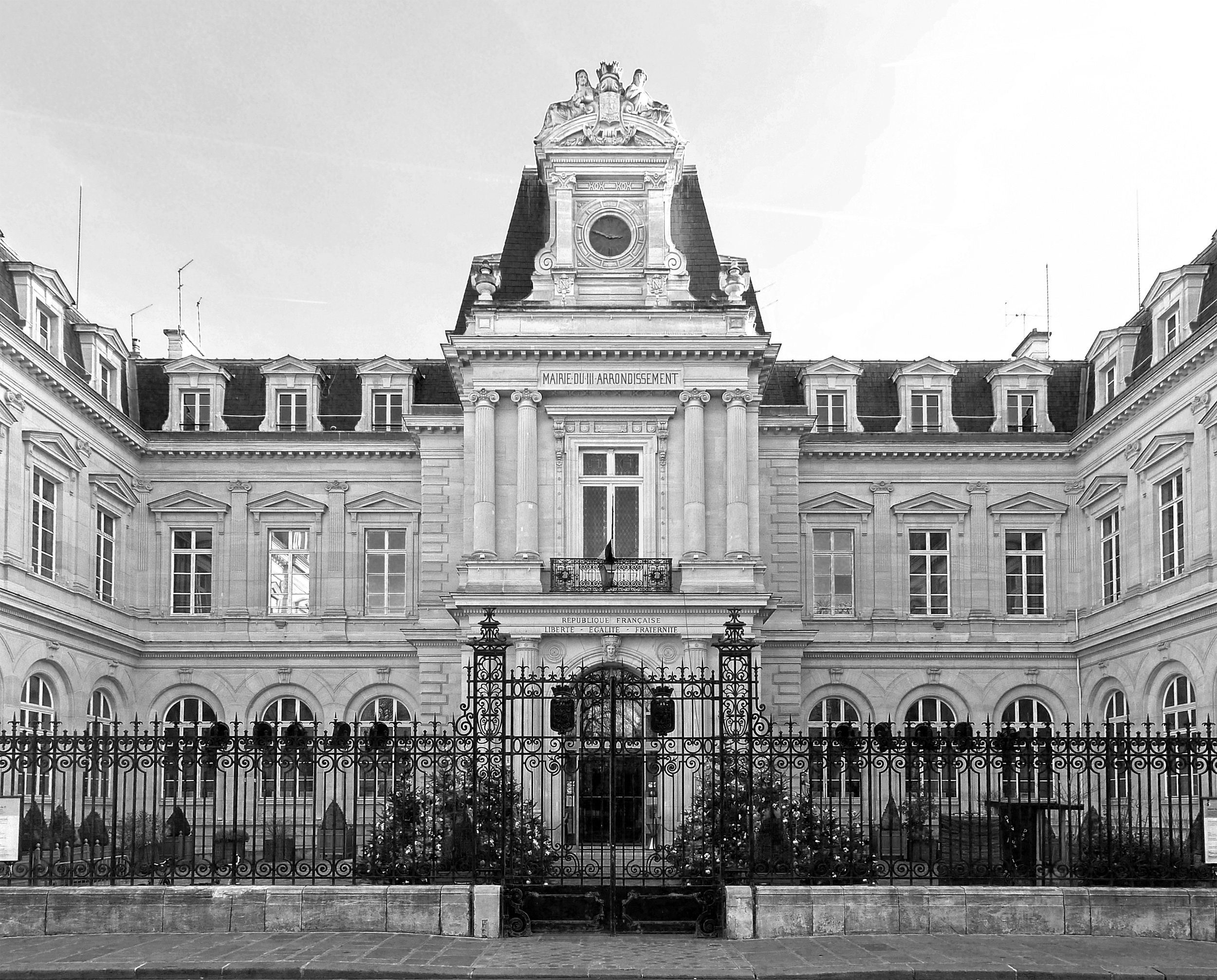 Mairie du IIIe arrondissement de Paris, rue Eugène-Spuller